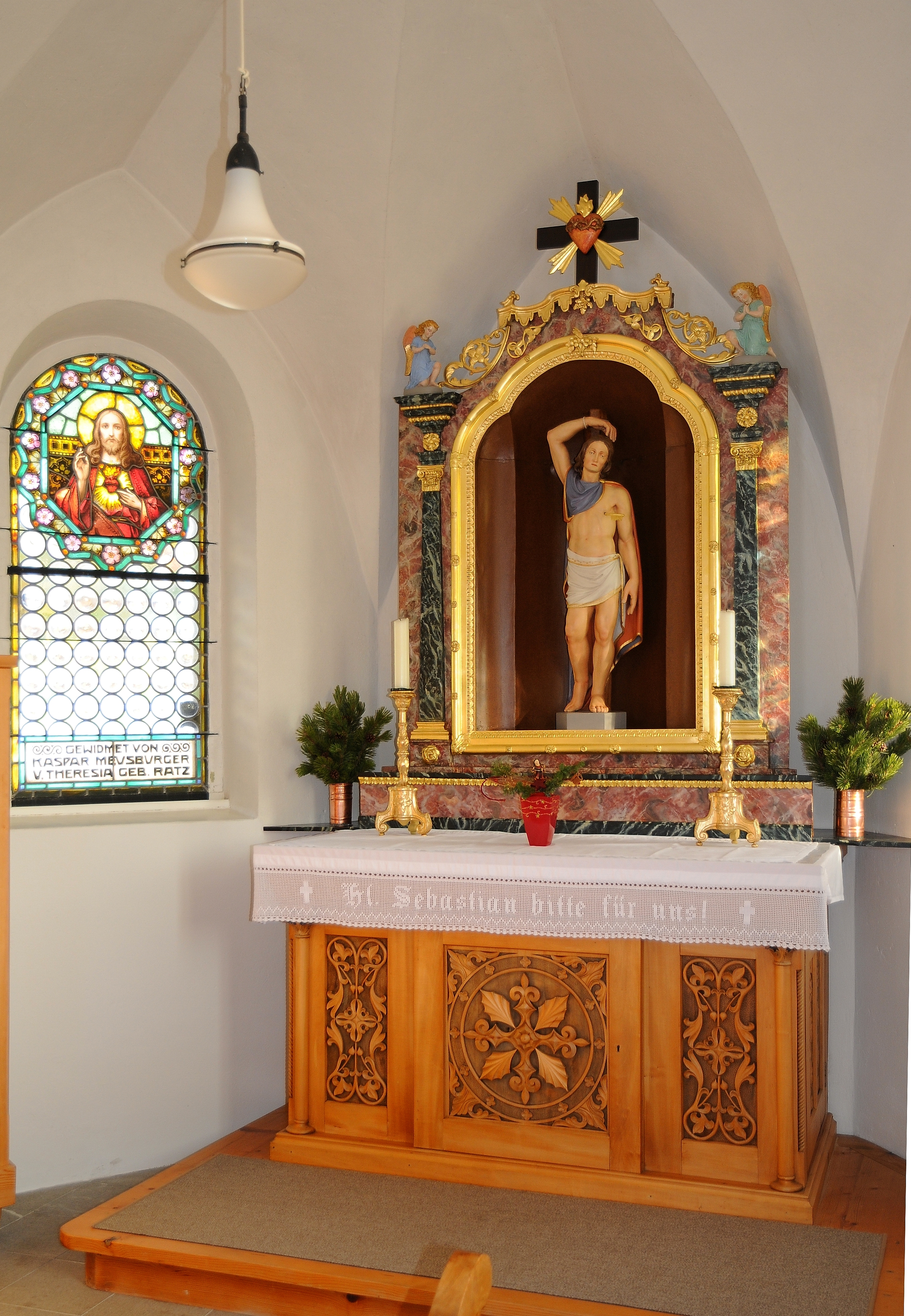 Kapelle hl. Sebastian, in Oberbezau (Oberhalden) Anstelle eines abgebrochenen Vorgängerbaues 1913 neugebaut. Deckenbild 1938von Hans Strobl.